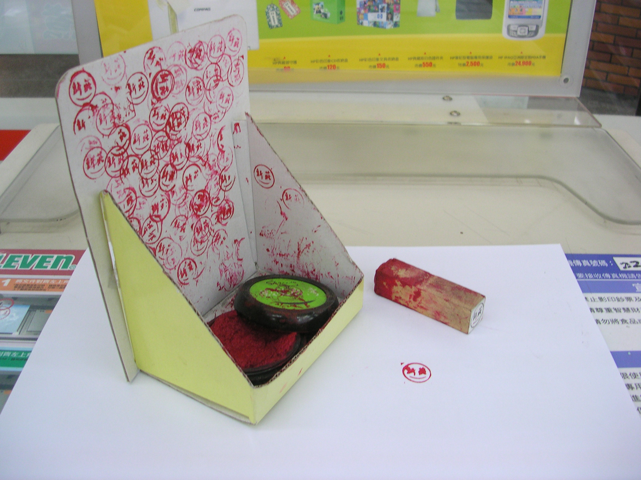 臺灣臺北縣新莊市的微笑臺灣鄉鎮紀念戳章，投稿者同撮影者koika。